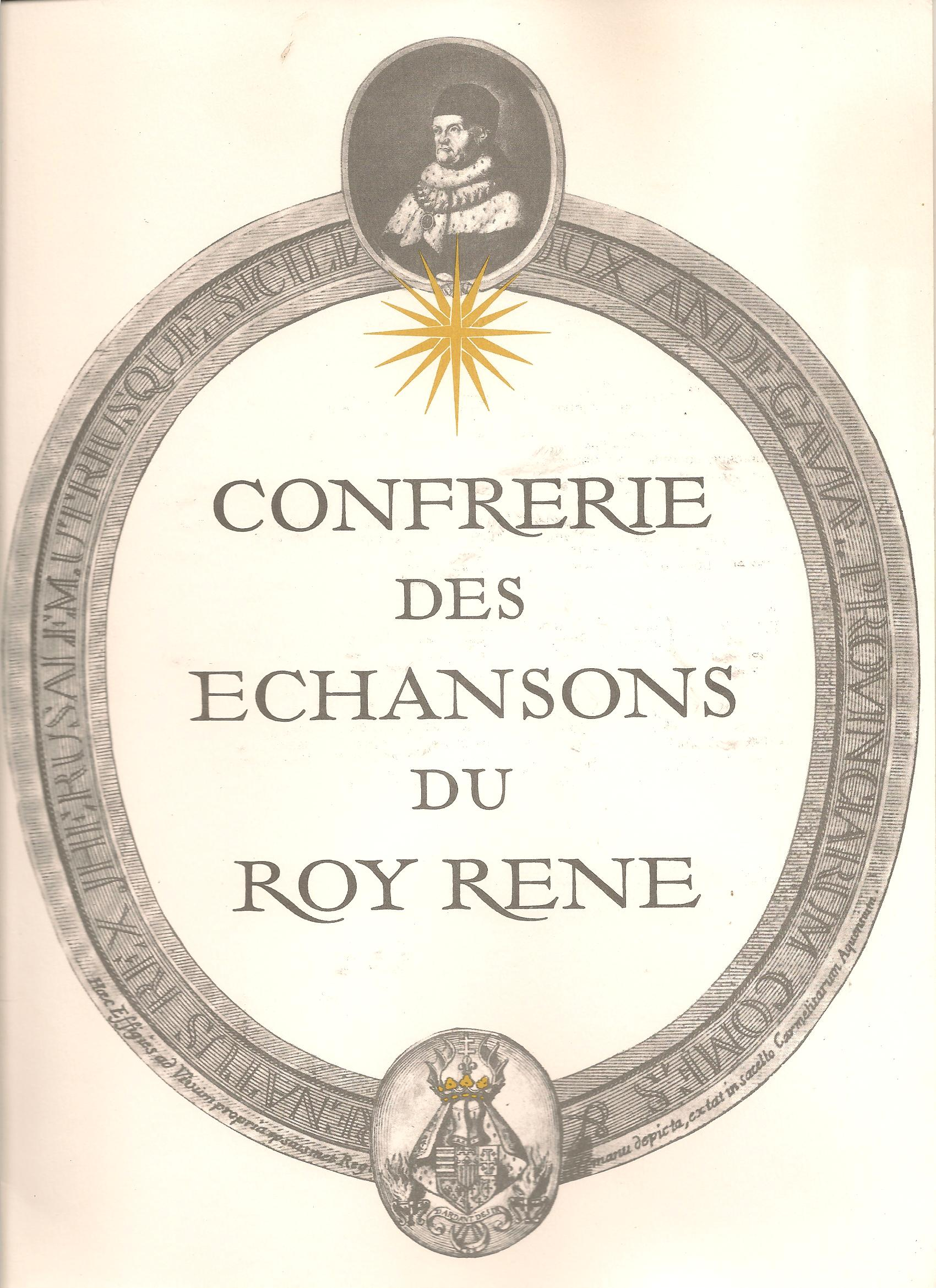 Logo de la confrérie des Echansons du Roy René